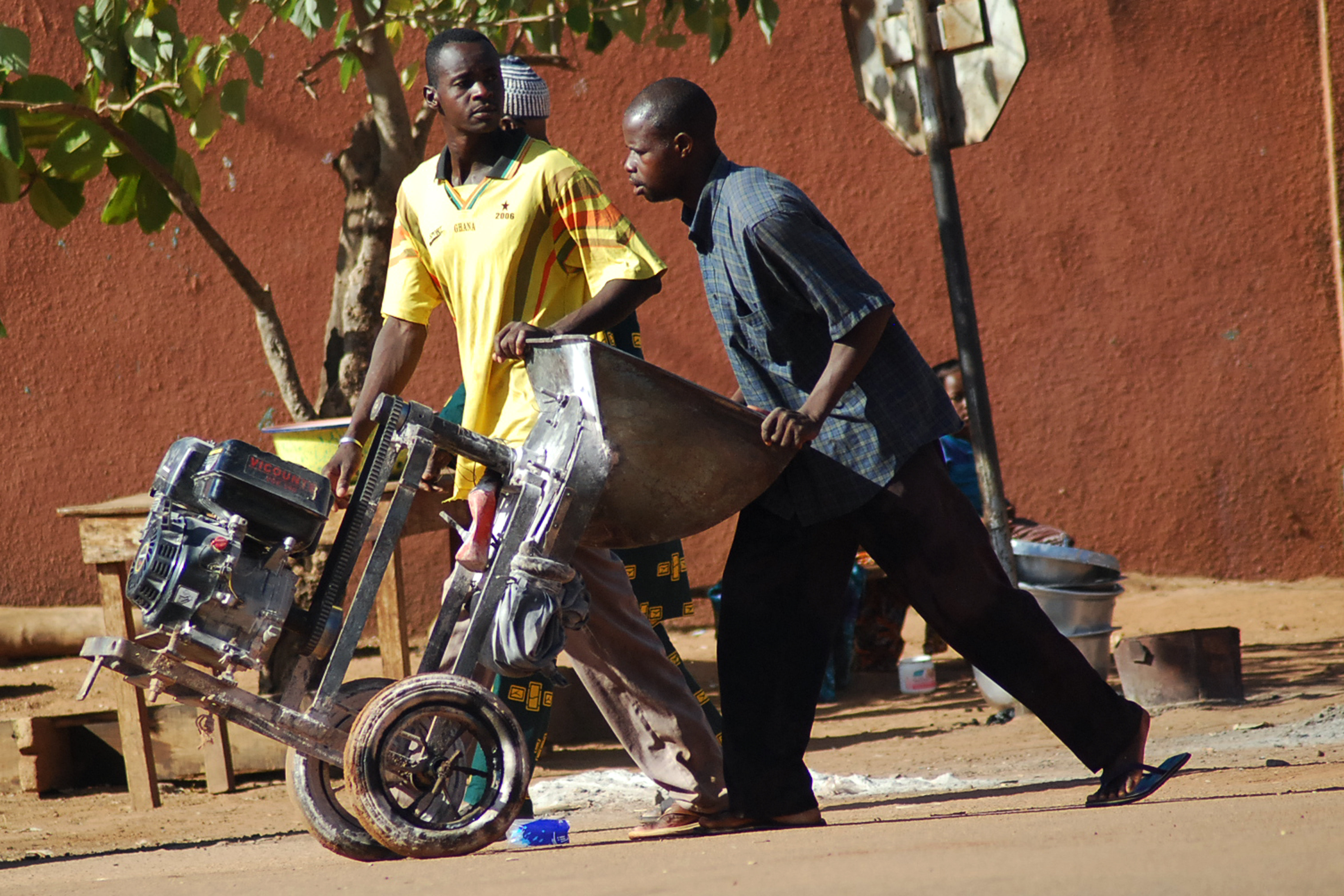 moulin dans les rues de Ouagadougou This is an image with the theme "Africa on the Move or Transport" from: Burkina Faso